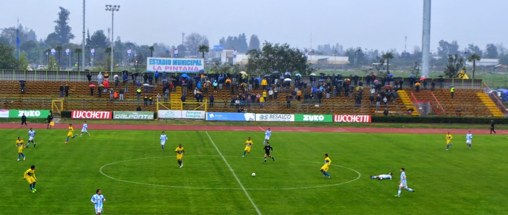 Estadio Municipal de La Pintana, Santiago